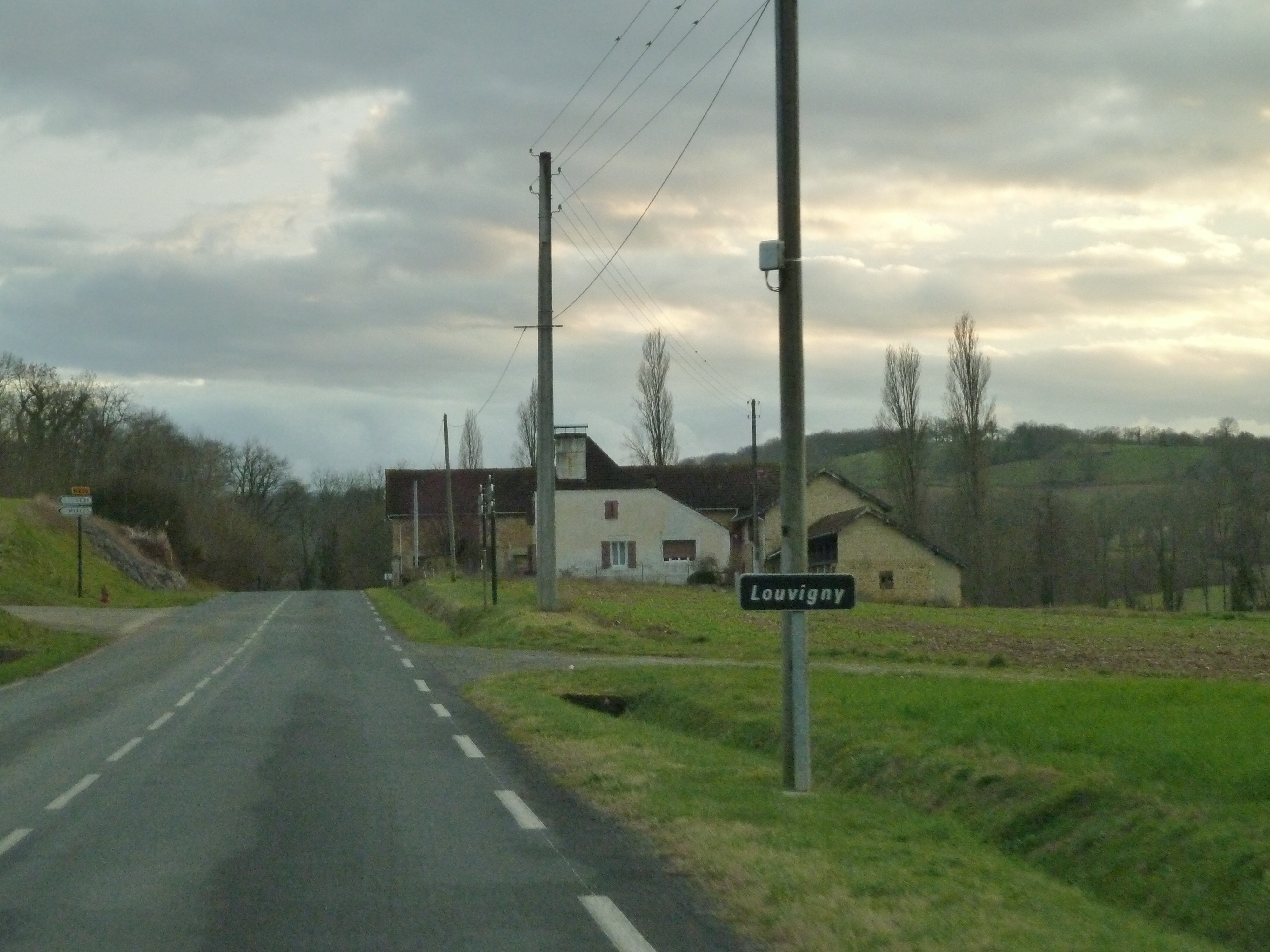 Entrée dans Louvigny (Pyrénées-Atlantiques)